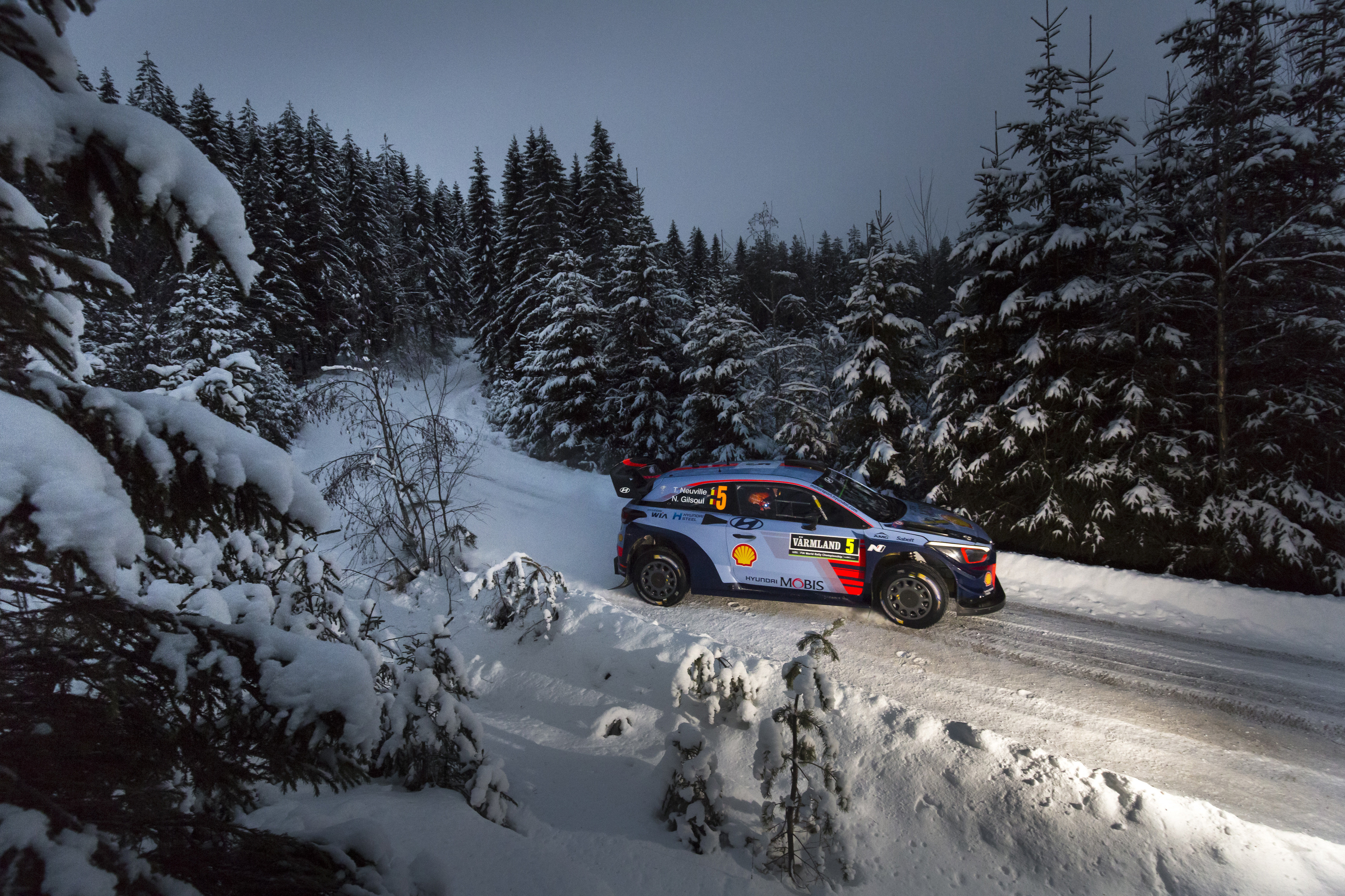 Thierry Neuville podczas Rajdu Szwecji 2017